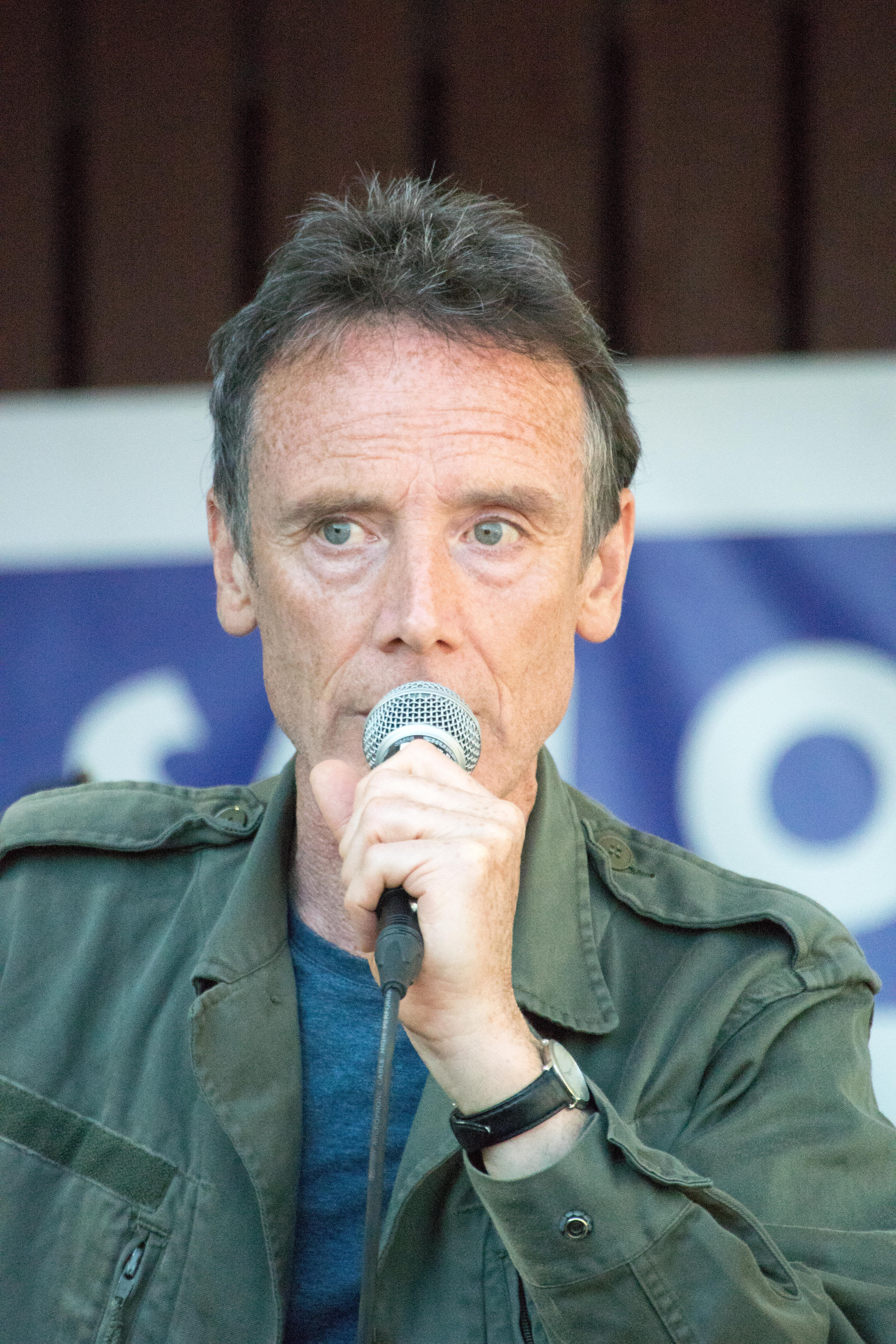 Paul Oxley